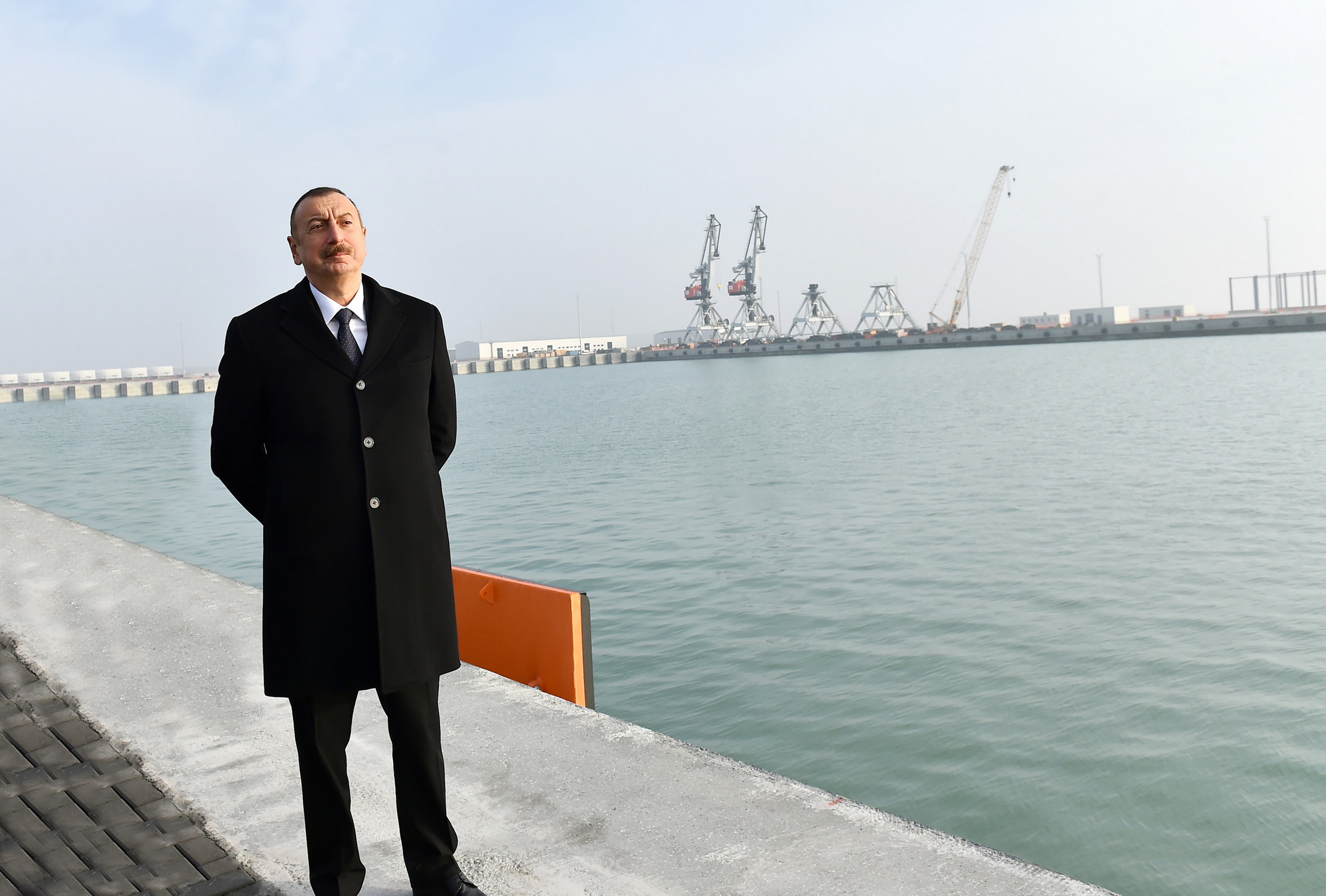 Prezident İlham Əliyev paytaxtın Qaradağ rayonunun Ələt qəsəbəsində Bakı Beynəlxalq Dəniz Ticarət Limanı kompleksində Ro-Ro terminalının açılışında iştirak edib, kompleksdə görülən işlərlə tanış olub. Prezident İlham Əliyevə yeni Ro-Ro terminalı barədə məlumat verildi. İldə 60 minə yaxın TIR və ya 1,8 milyon ton yük qəbul etmək imkanında olan terminal ən müasir texniki tələblərə uyğun tikilib. Terminaldakı birinci körpünün illik yükaşırma qabiliyyəti 800 min ton, ikinci körpününkü isə 1 milyon tondur. Ro-Ro terminalı iki yanalma körpüsündən ibarətdir. Birinci körpünün uzunluğu 222 metr, ikinci körpünün uzunluğu isə 190 metrə yaxındır. Terminal daşımaların avtomobil-su və su-avtomobil seqmentlərində təkərli texnikanın daşınması üçün nəzərdə tutulur.